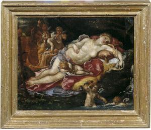 Venere Dormiente con amorini e un satiro - Pietro Santi Bambocci, huile sur toile 26x32,5 cm